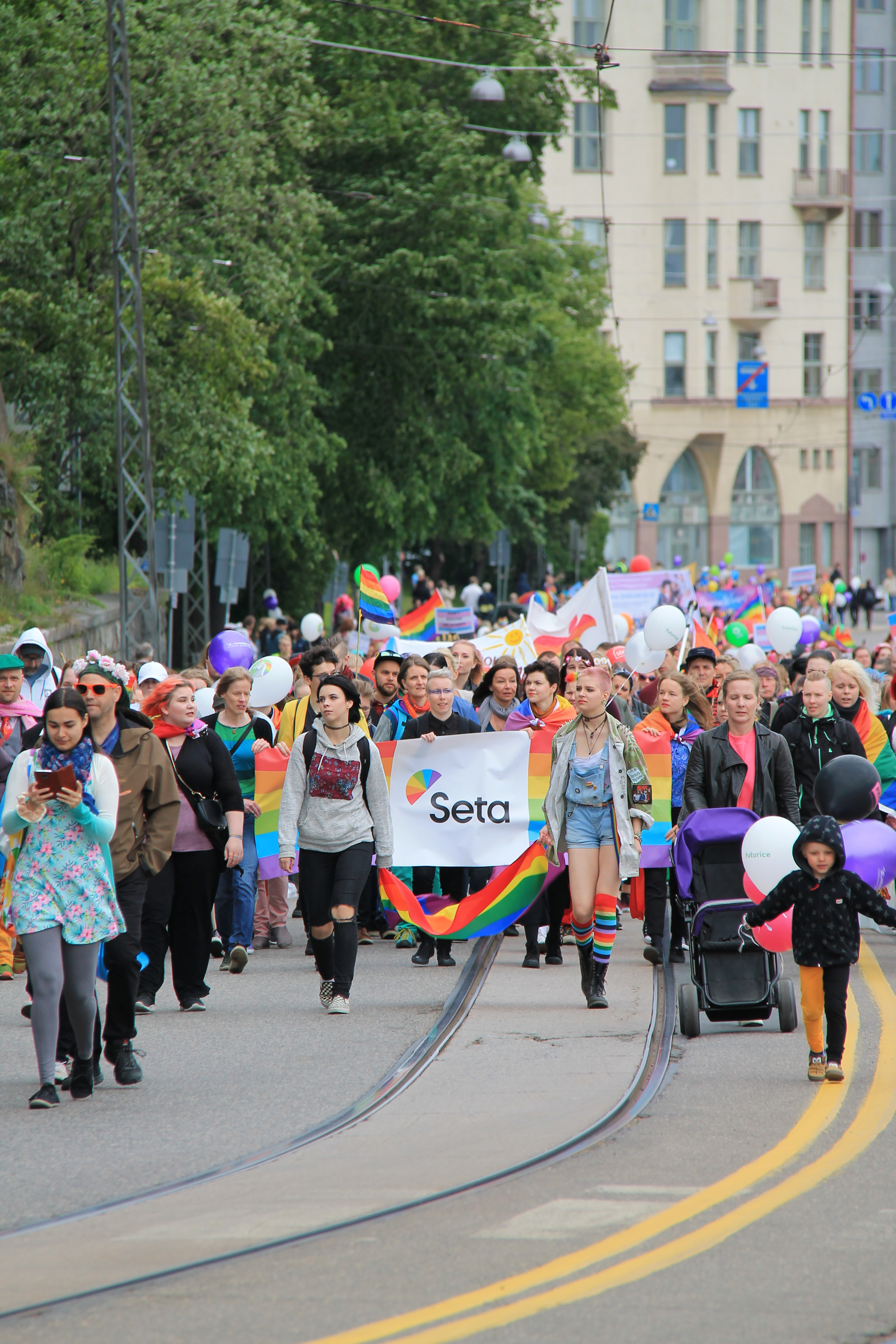 Kuvassa on Helsinki Pride -kulkueen osallistujia Olympiaterminaarin kohdalla. Keskellä kuvaa on Setan puheenjohtaja Viima Lampinen pitämässä kiinni Setan banderollista.